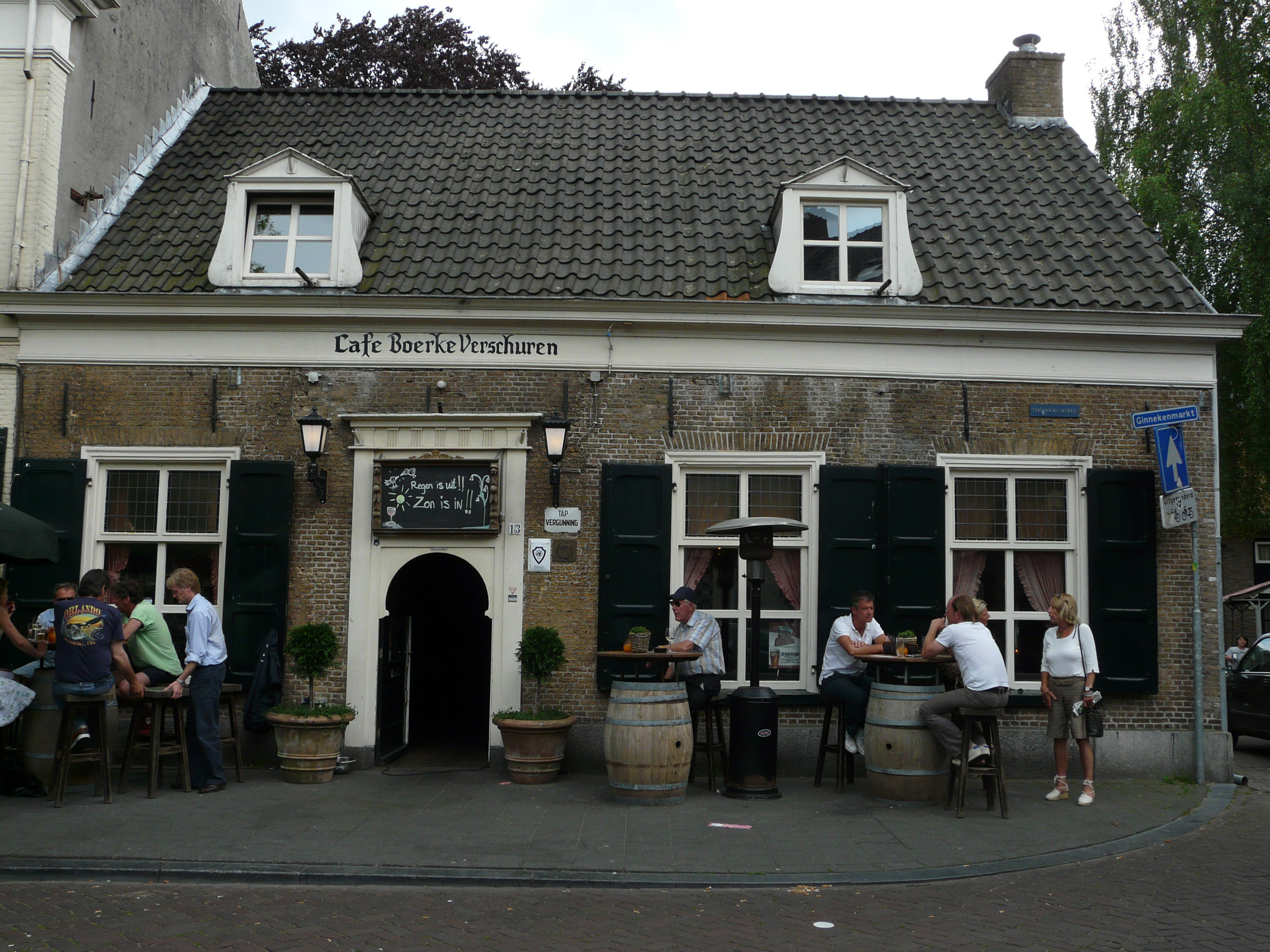 Zicht op een deel van Cafe Boerke Verschuren, Ginnekenmarkt 13, 4835 JC Breda. Gevestigd op de Ginnekenmarkt in de wijk het Ginneken in het zuiden van Breda